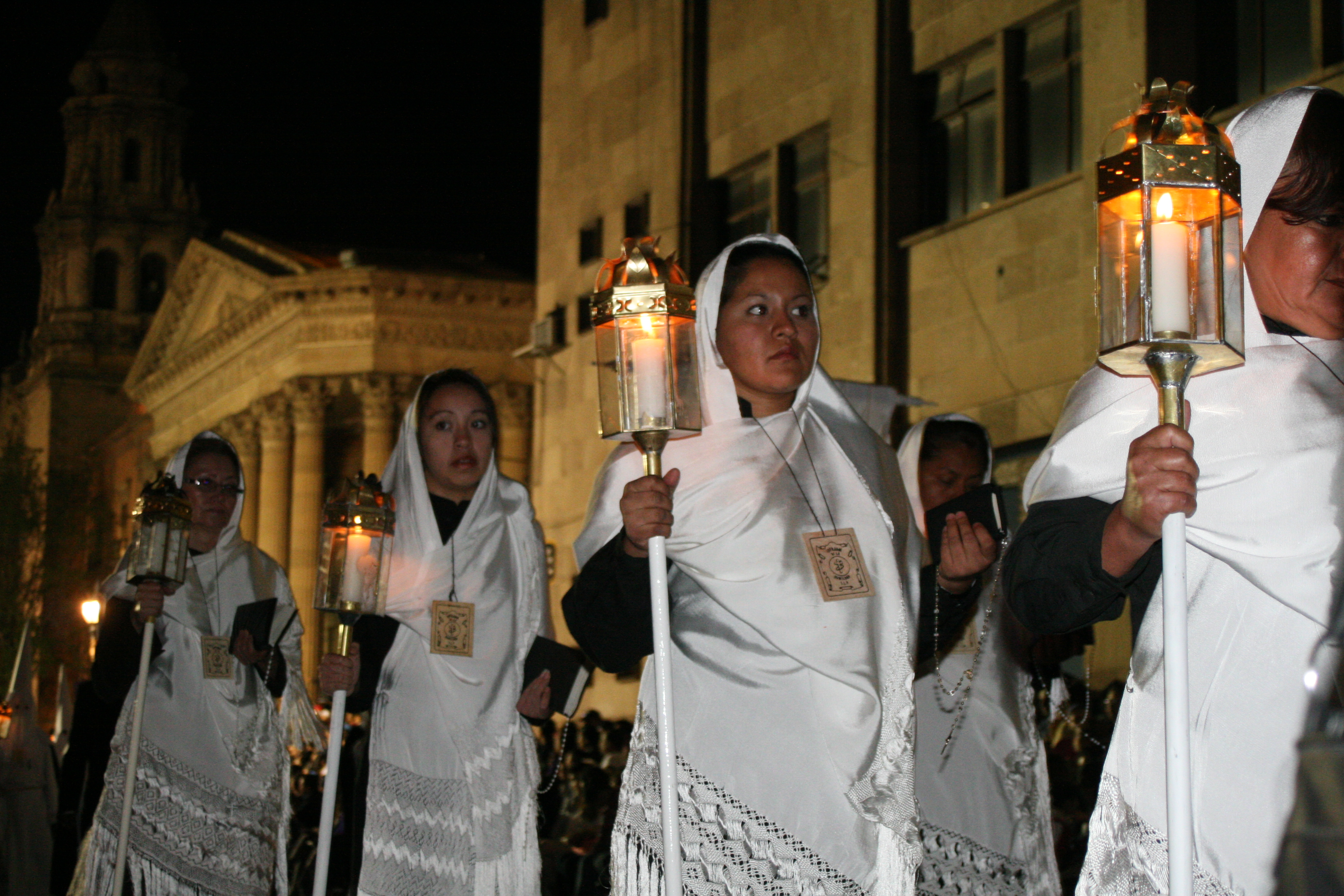 Procesión del Silencio: Cofradía San Agustín en el Templo San Agustín San Luis Potosí, México.